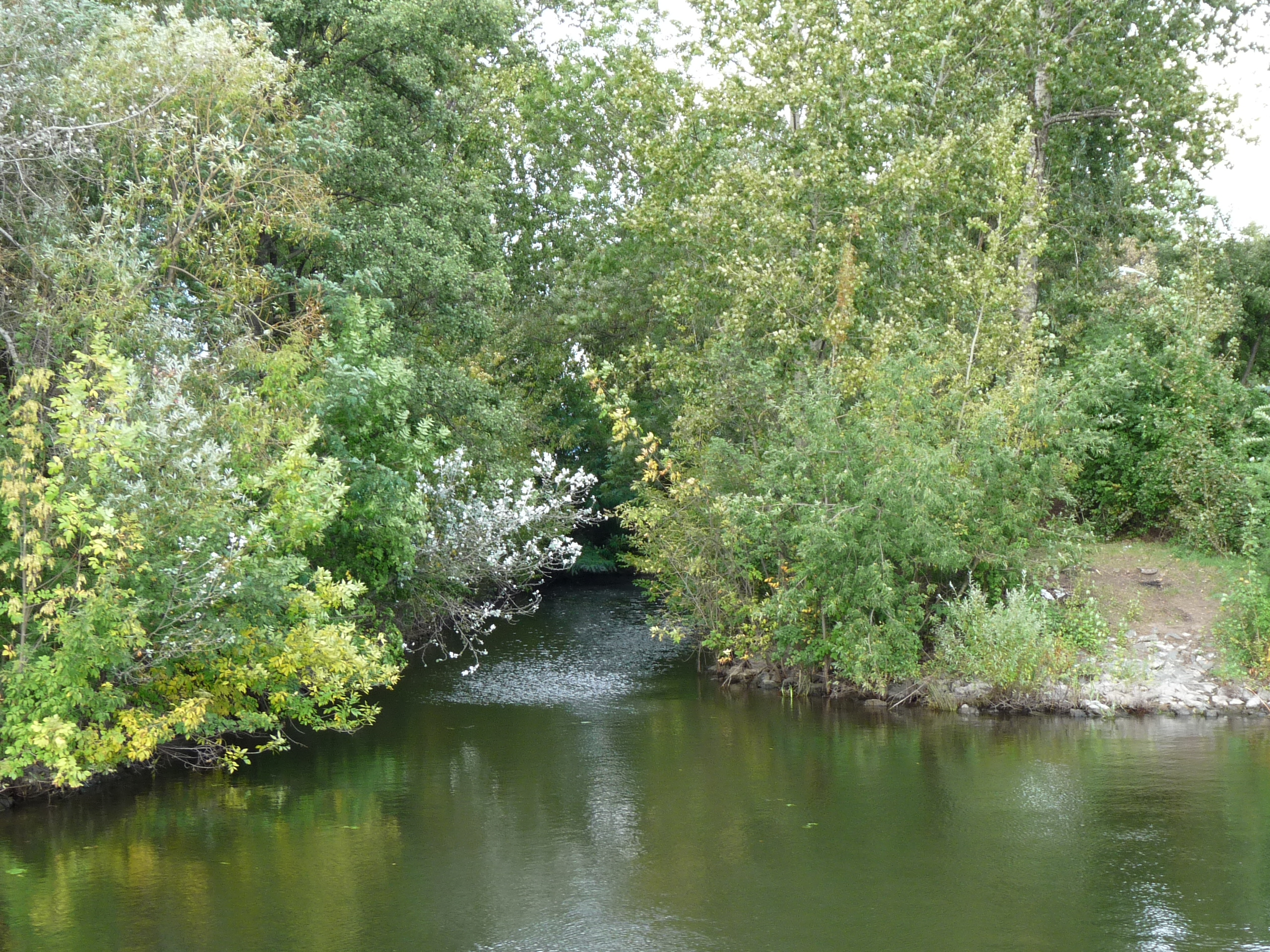 Einmündung Grützmachergraben am Kilometer 1,48 der Spree-Oder-Wasserstraße